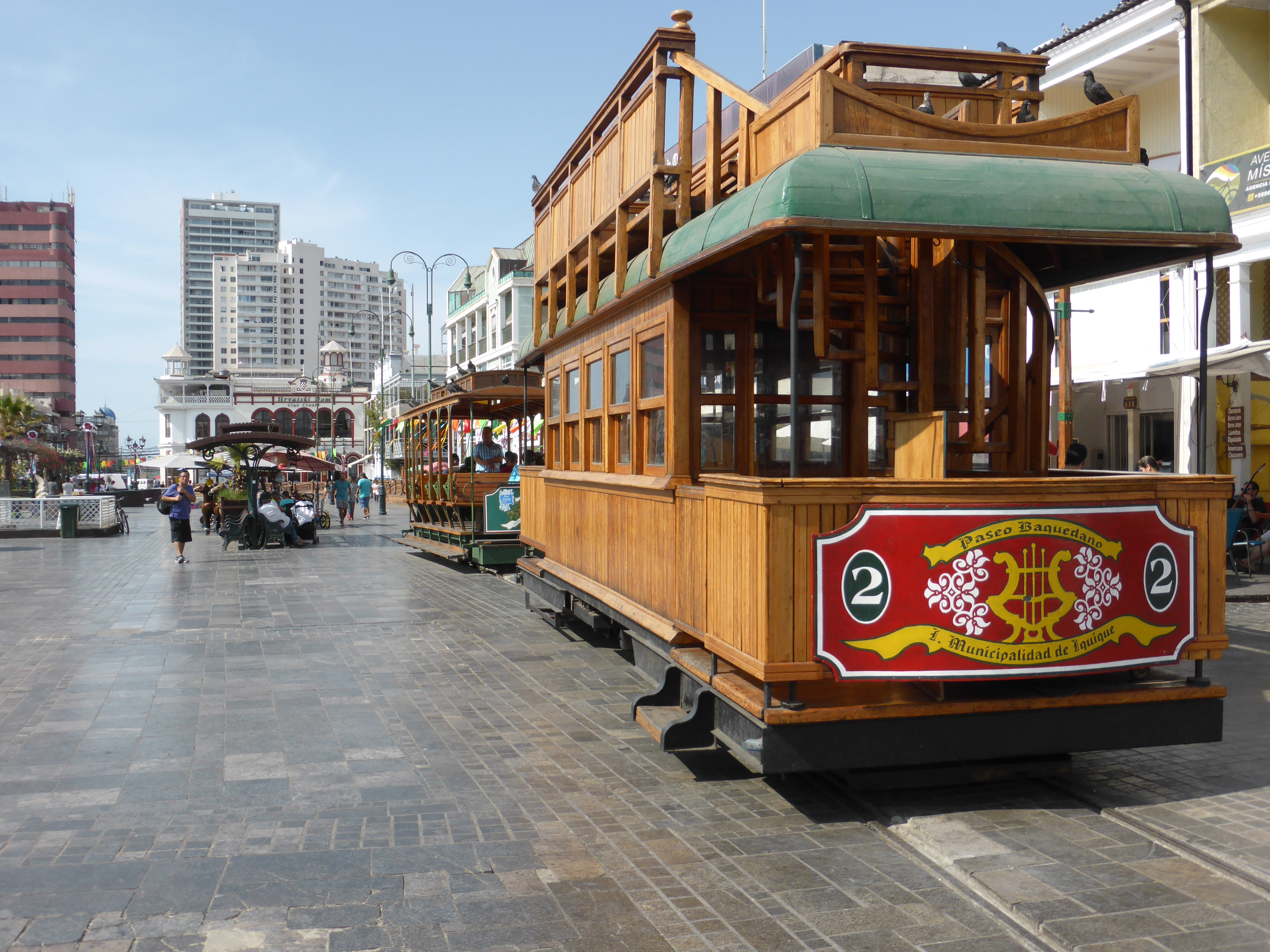 Desde la Plaza Arturo Prat salen estos dos tranvías turísticos. Vía de trocha métrica (vía de 1000 mm). Paseo que ofrece la Municipalidad de Iquique, con nuevos tranvías que funcionan a baterías.